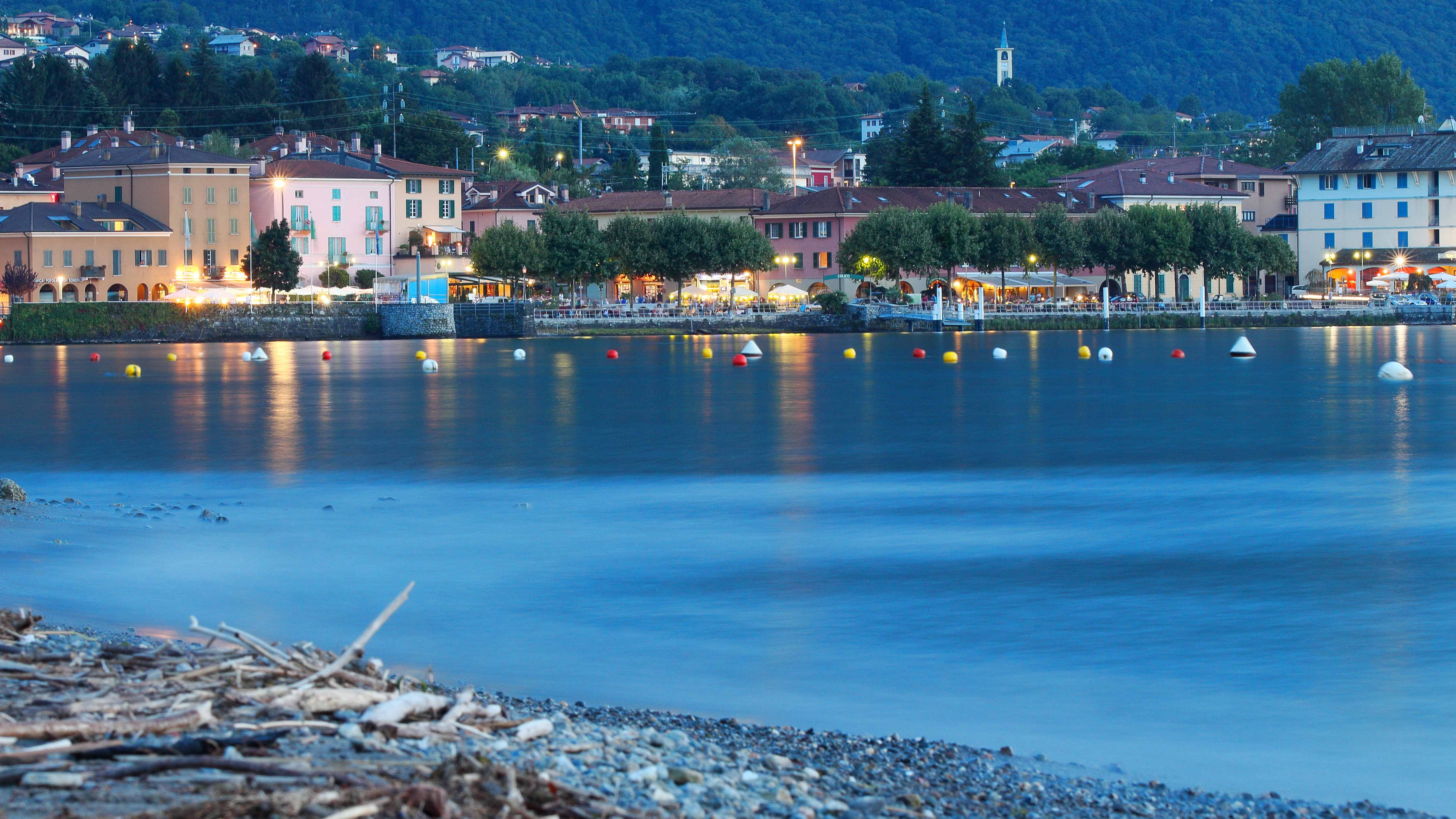 Colico, Italy, 27.07.2014, 21:15